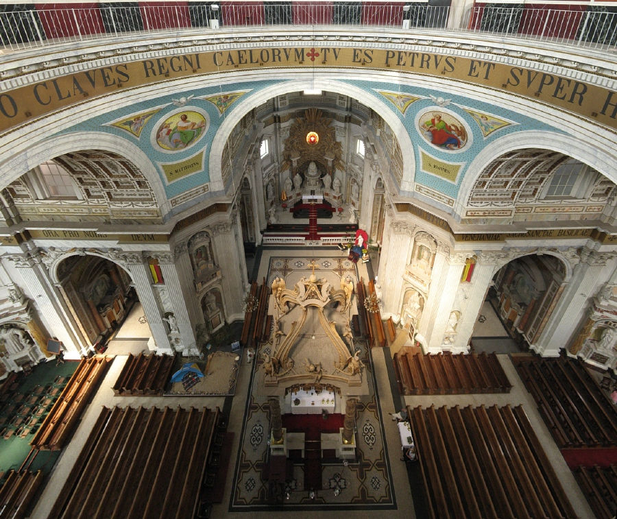 De Basiliek van de Heiligen Agatha en Barbara is een rooms-Katholieke kerk te Oudenbosch. Interieur van basiliek van Oudenbosch, verticale panoramafoto vanuit koepel.